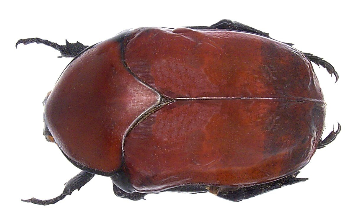 Familie: Scarabaeidae Groesse: 23 mm Fundort: Mexiko, Christobal, Chiapas det. U.Schmidt Foto: U.Schmidt, 2006